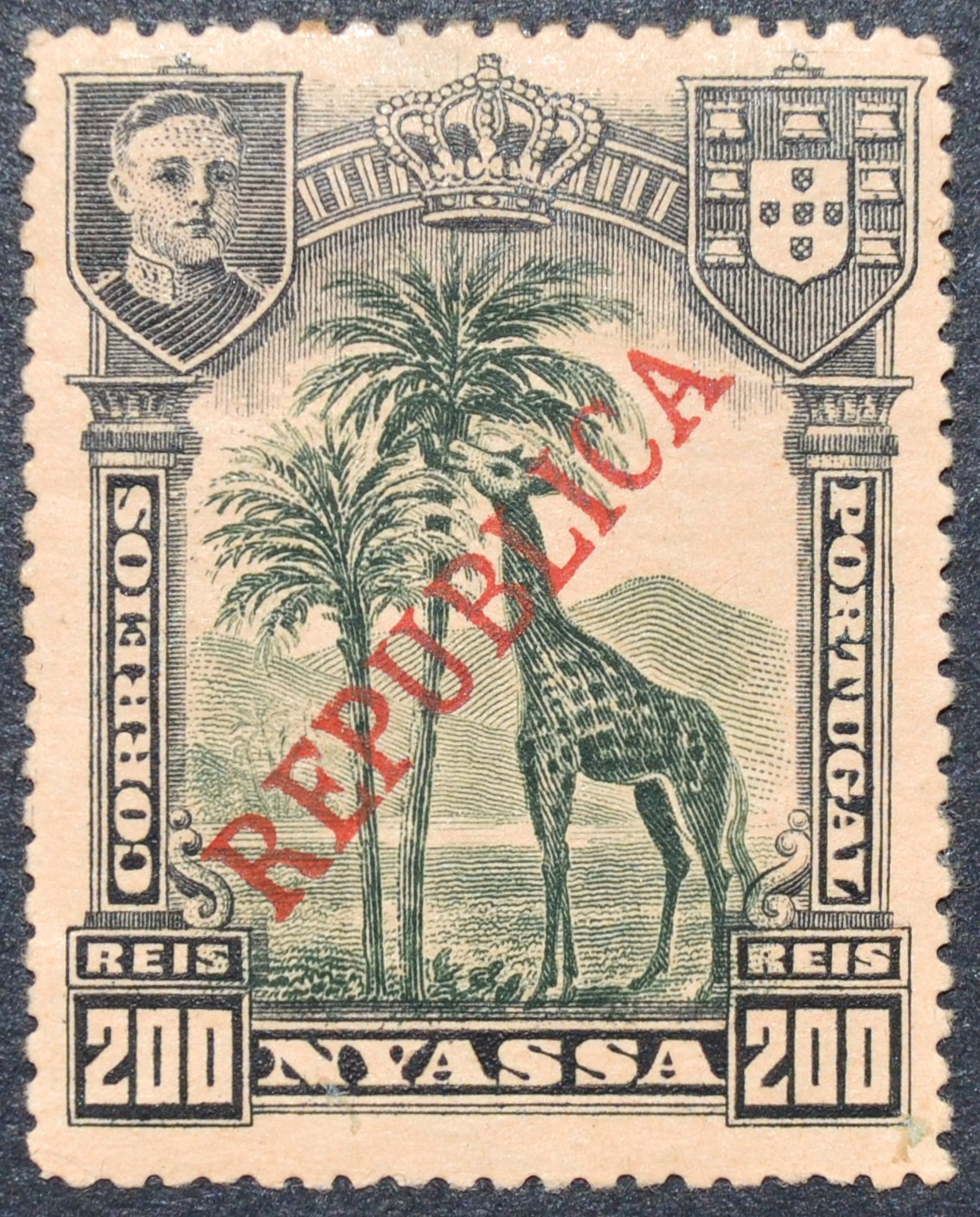 Companhia do Niassa - Selo da monarquia com a sobrecarga "República", datado de 1911.